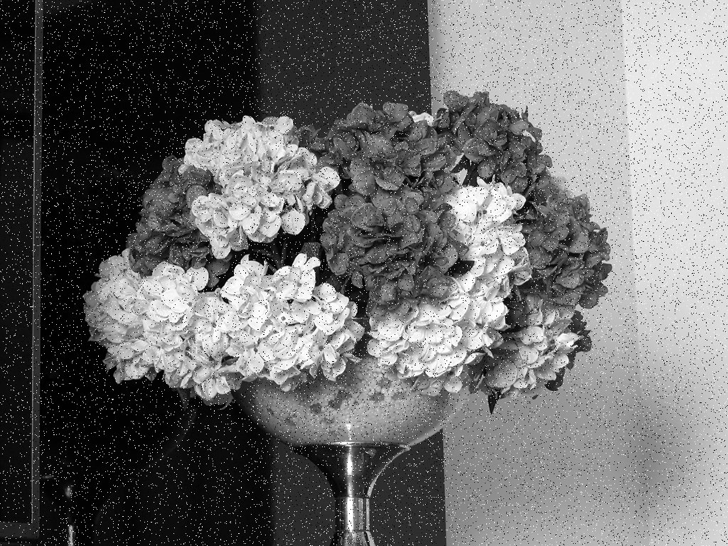 pb